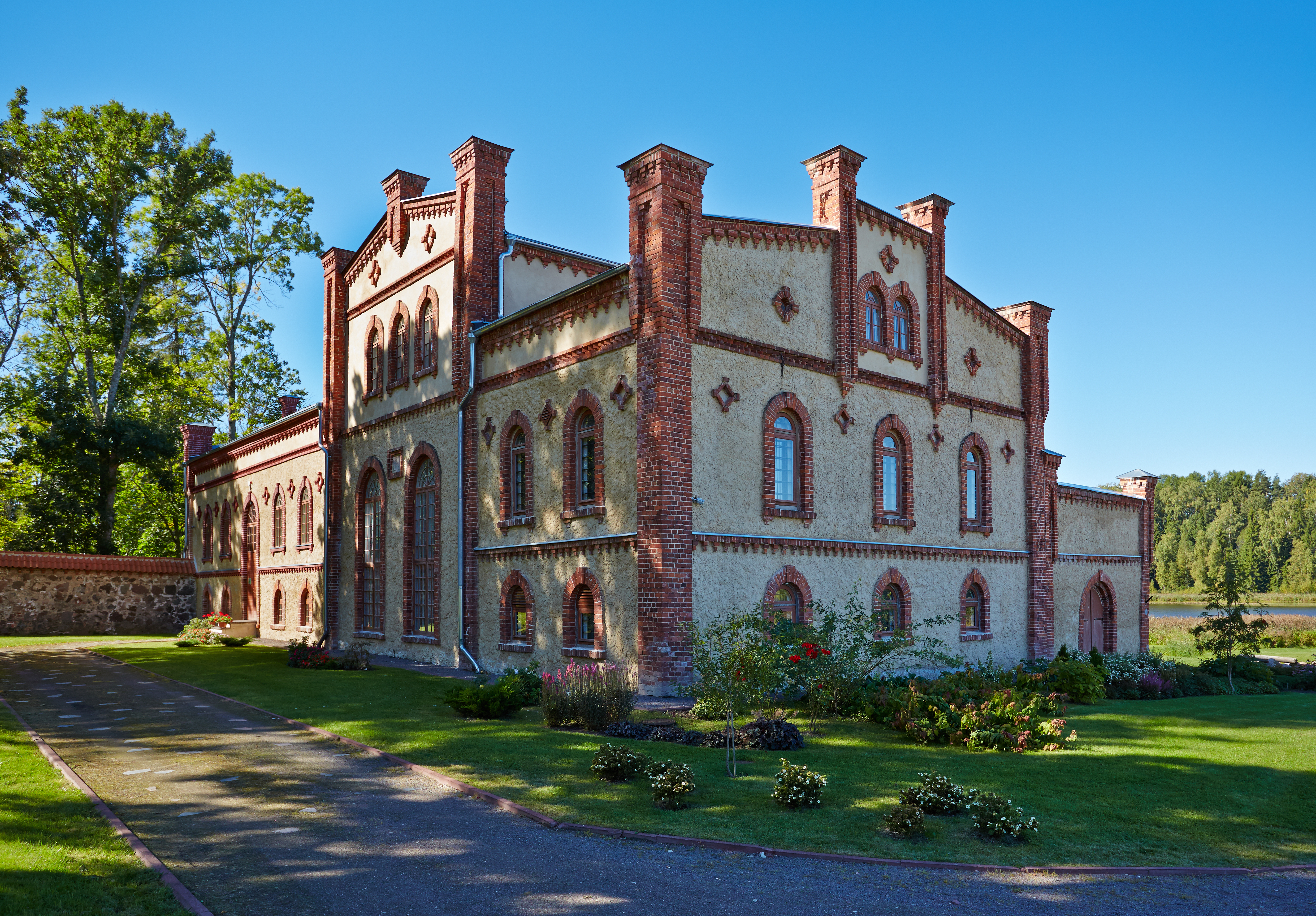 Mooste mõisa viinavabrik